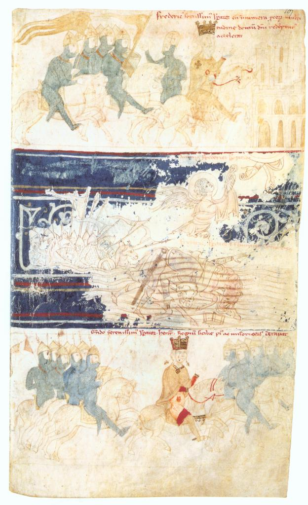 Oben: Aufbruch Friedrich Barbarossas zum Kreuzzug. Mitte: Barbarossas ertrinkt im Fluss Saleph 1190 (nachträglich durch Übermalung unkenntlich gemacht) Unten: Heinrich VI. besetzt 1191 Sizilien. Petrus von Eboli, Liber ad honorem Augusti, Bern, Burgerbibliothek, Codex 120. II, fol. 107r.